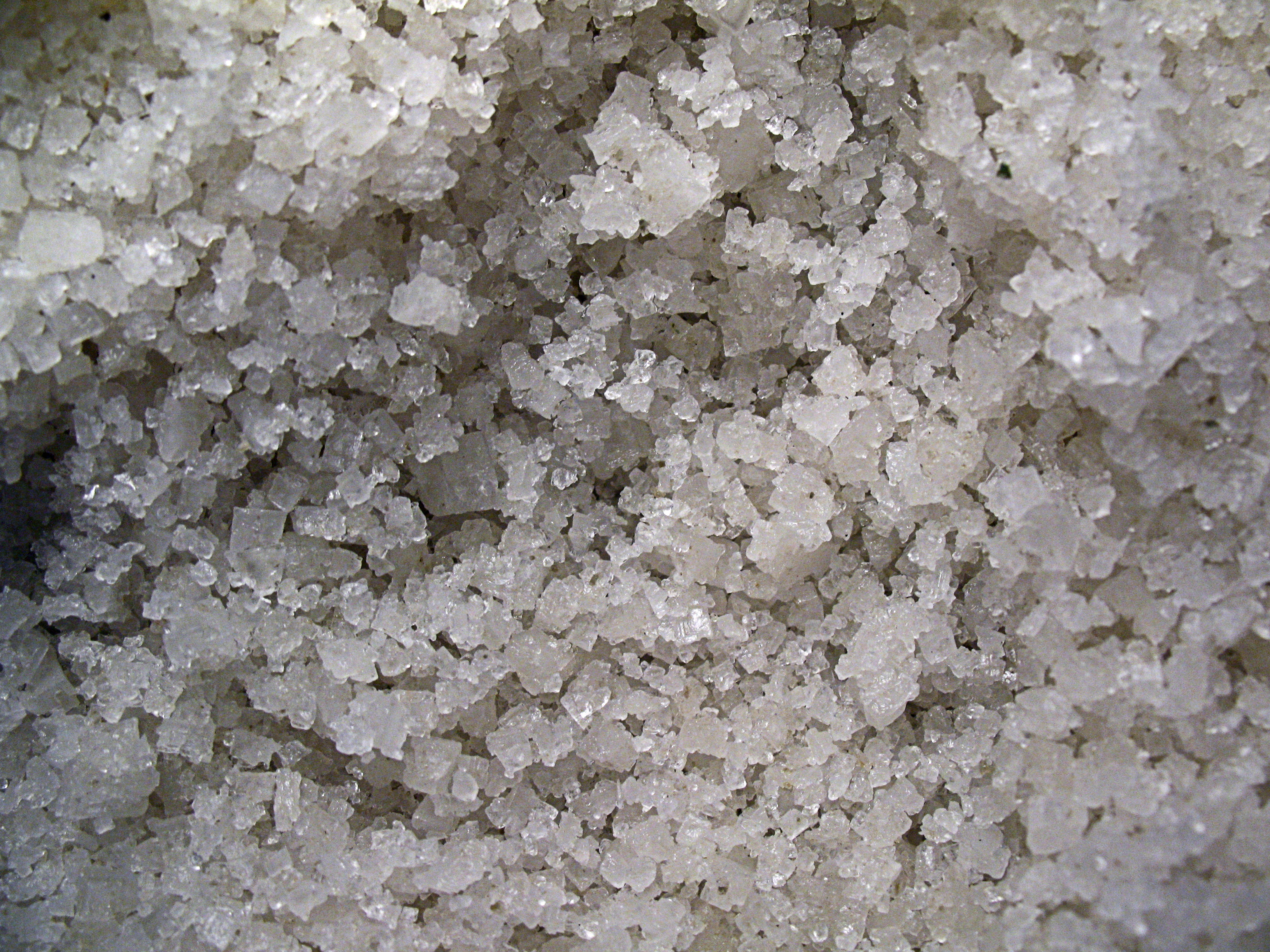 Körniges Badesalz aus den "Salzgärten" aus der "Slowenischen Riviera"